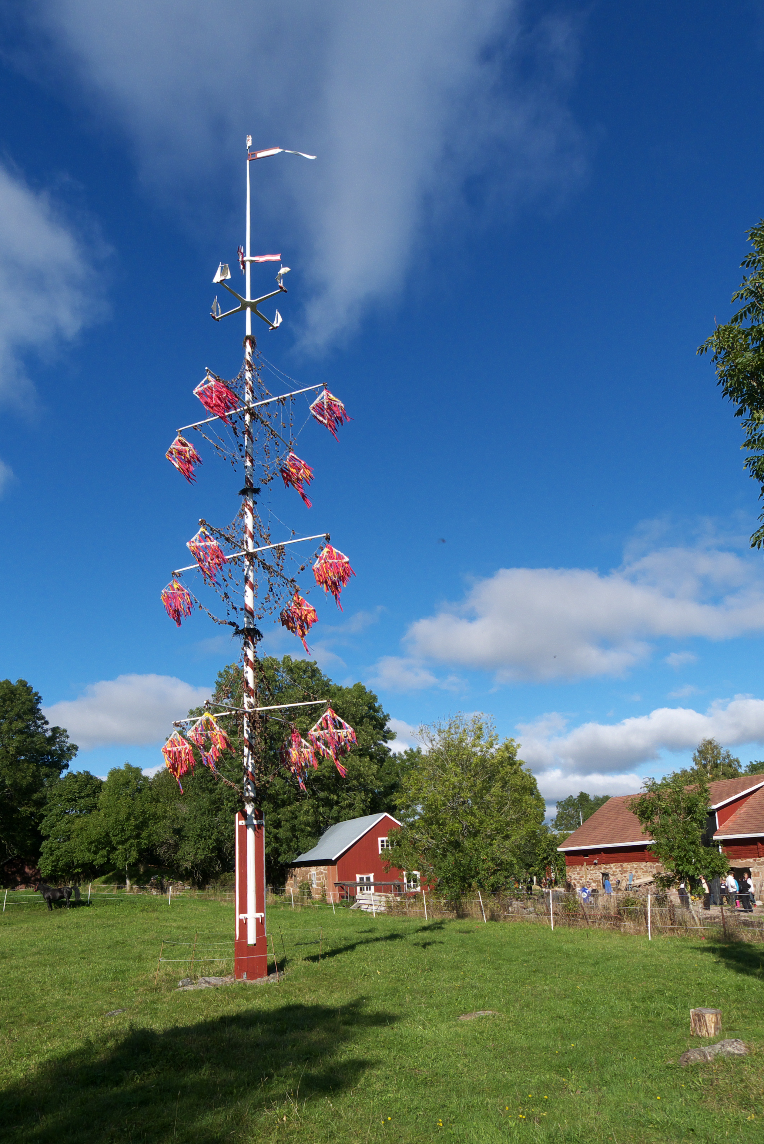 Åländsk Midsommarstång